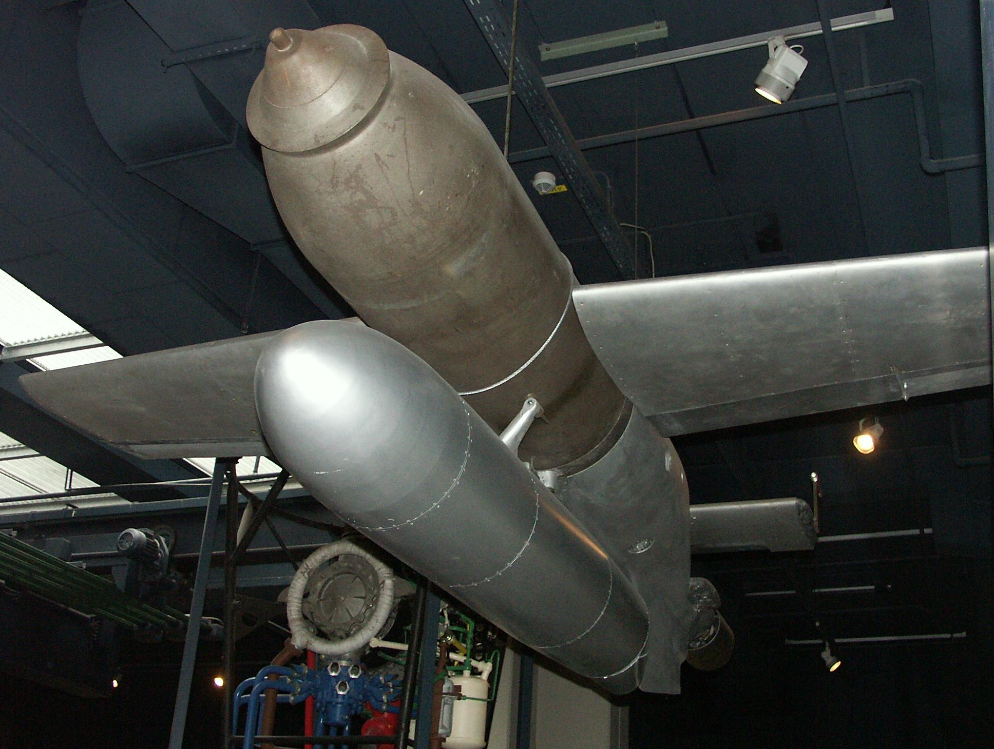 Deutsches Museum Munich photo Jean-Patrick Donzey